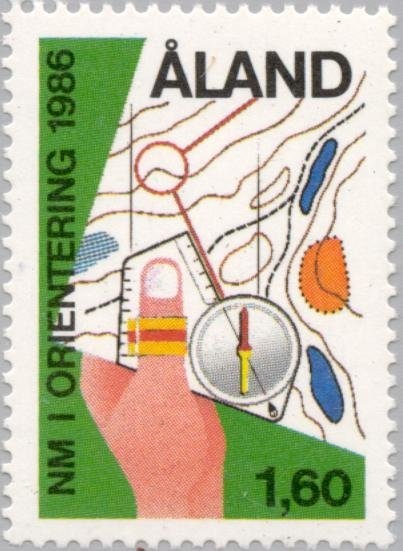 Страна: Аландские острова Серии: Неизвестные серии Код по каталогу: Michel Åla 15 Тематический список: Измерительные приборы | Картография | Карты | Компасы | Ориентирование | Особый случай | Спорт Дата выпуска: 1986-01-02 Дата истечения срока действия: 2002-06-30 Формат: Марка Издание: Commemorative Цвет: Многоцветный | зеленый Номинальная стоимость : 1,60 mk - Финская марка